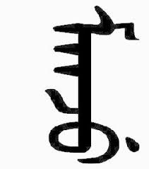 Монгол бичигт суурилсан манж бичгээр " Манж" гэж бичсэн нь.